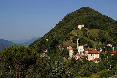 Brè (ob Lugano)